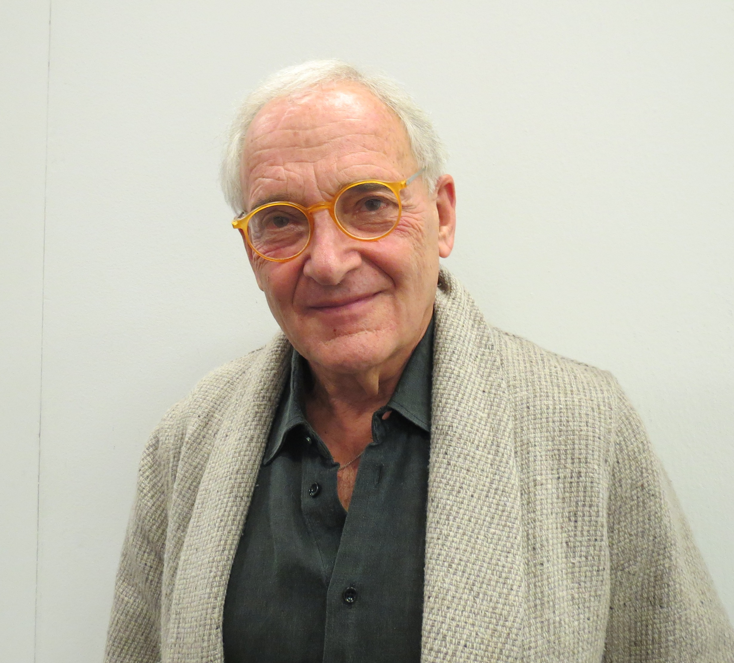 Lars Dencik, professor emeritus i socialpsykologi, på Bokmässan i Göteborg 2016.